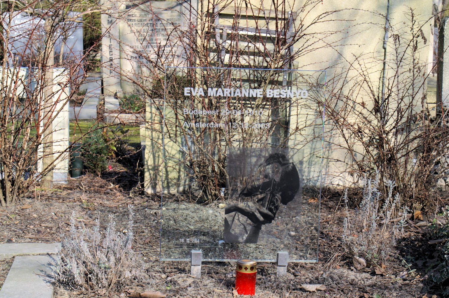 Foto van het graf van Eva Besnyö. Gemaakt door Han Fraijman, Almere.